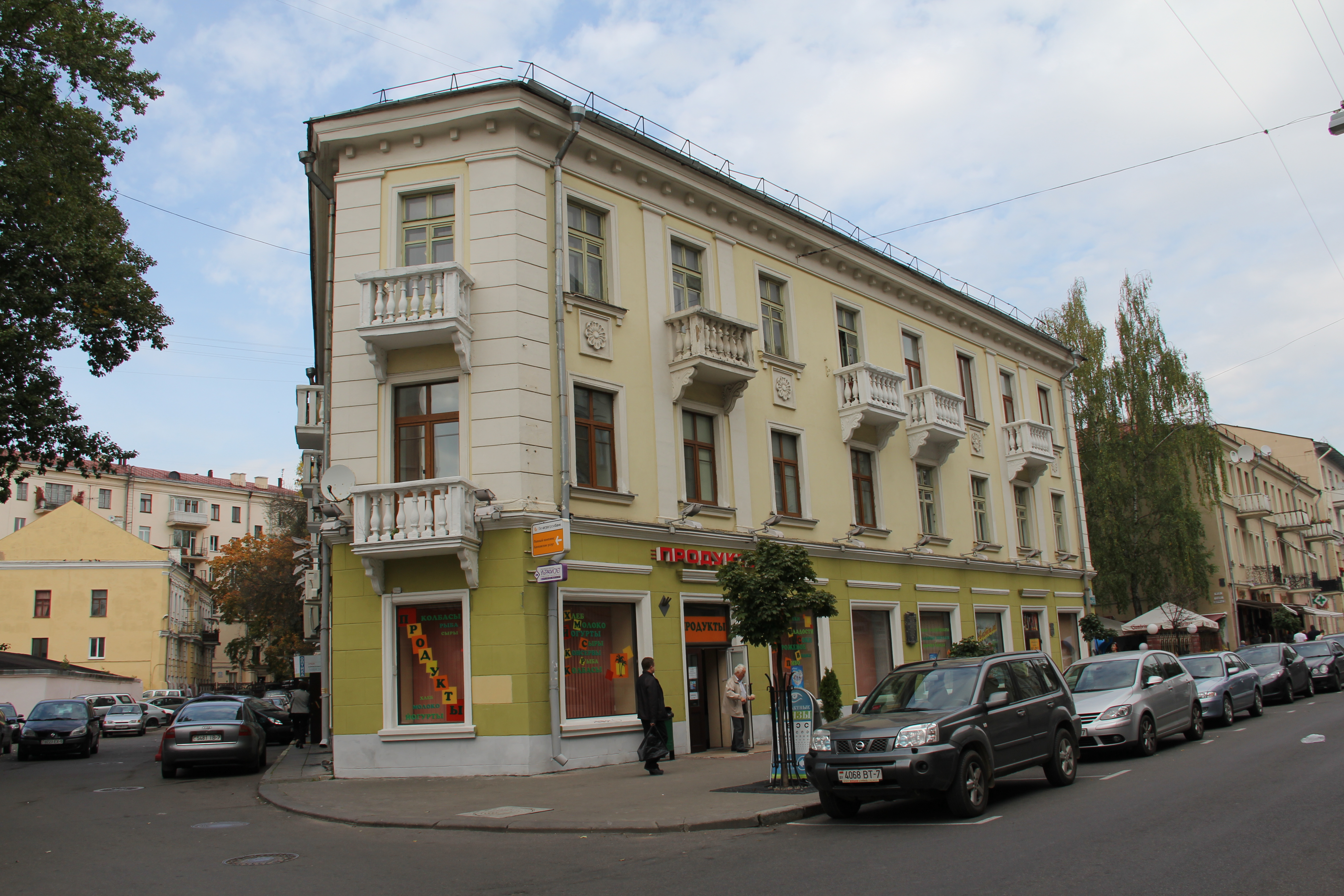 Беларуская (тарашкевіца): Будынак былога Менскага таварыства аматараў прыгожых мастацтваў. г. Менск This is a photo of Belarusian heritage monument. Reference number: 713Г000121 ( WLM)